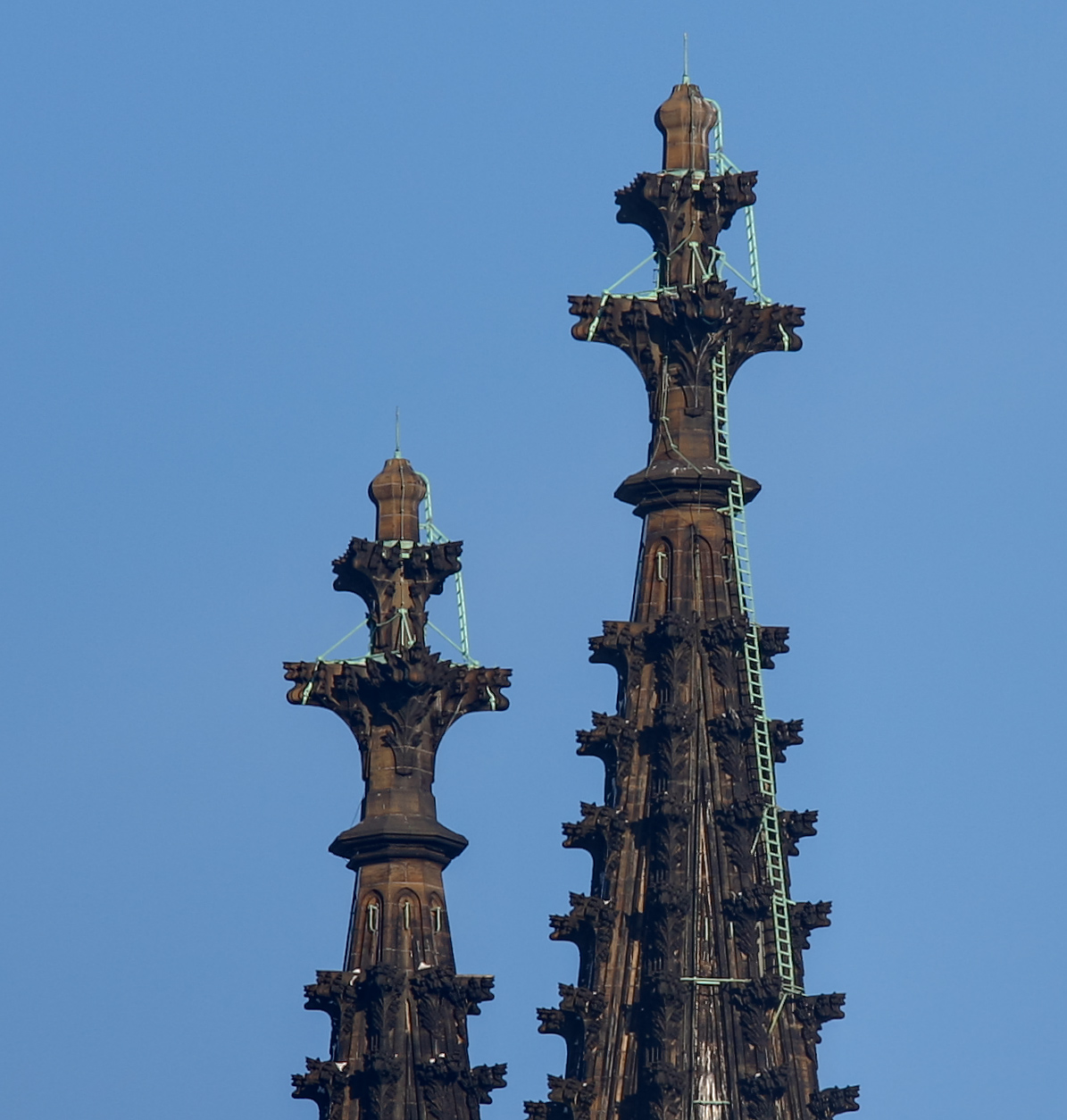 Kreuzblumen auf den Turmspitzen des Kölner Domes. Links hinten der Nordturm, rechts vorne der Südturm.